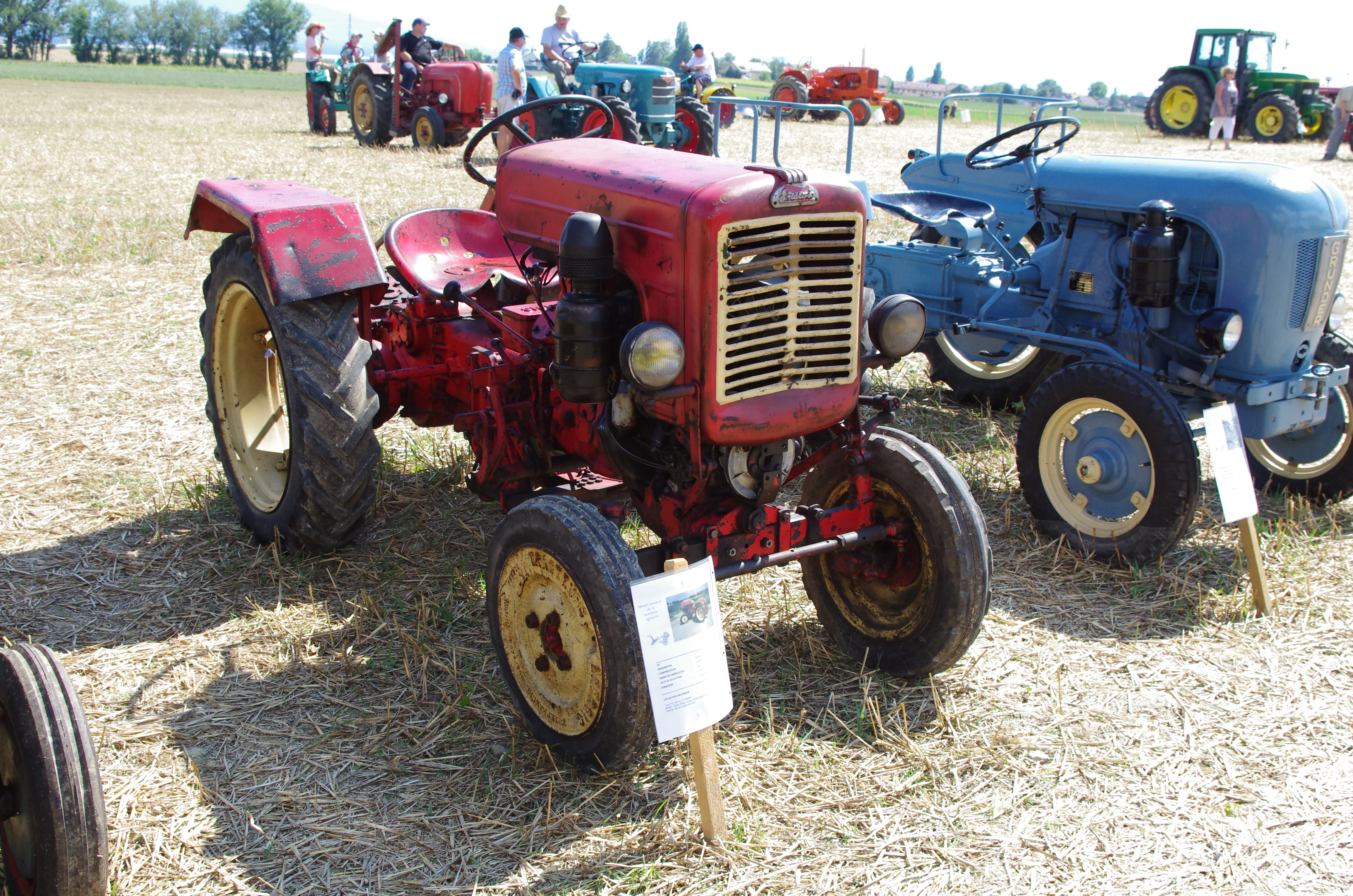 Tracteur Energic 512 C - 1965 - droite